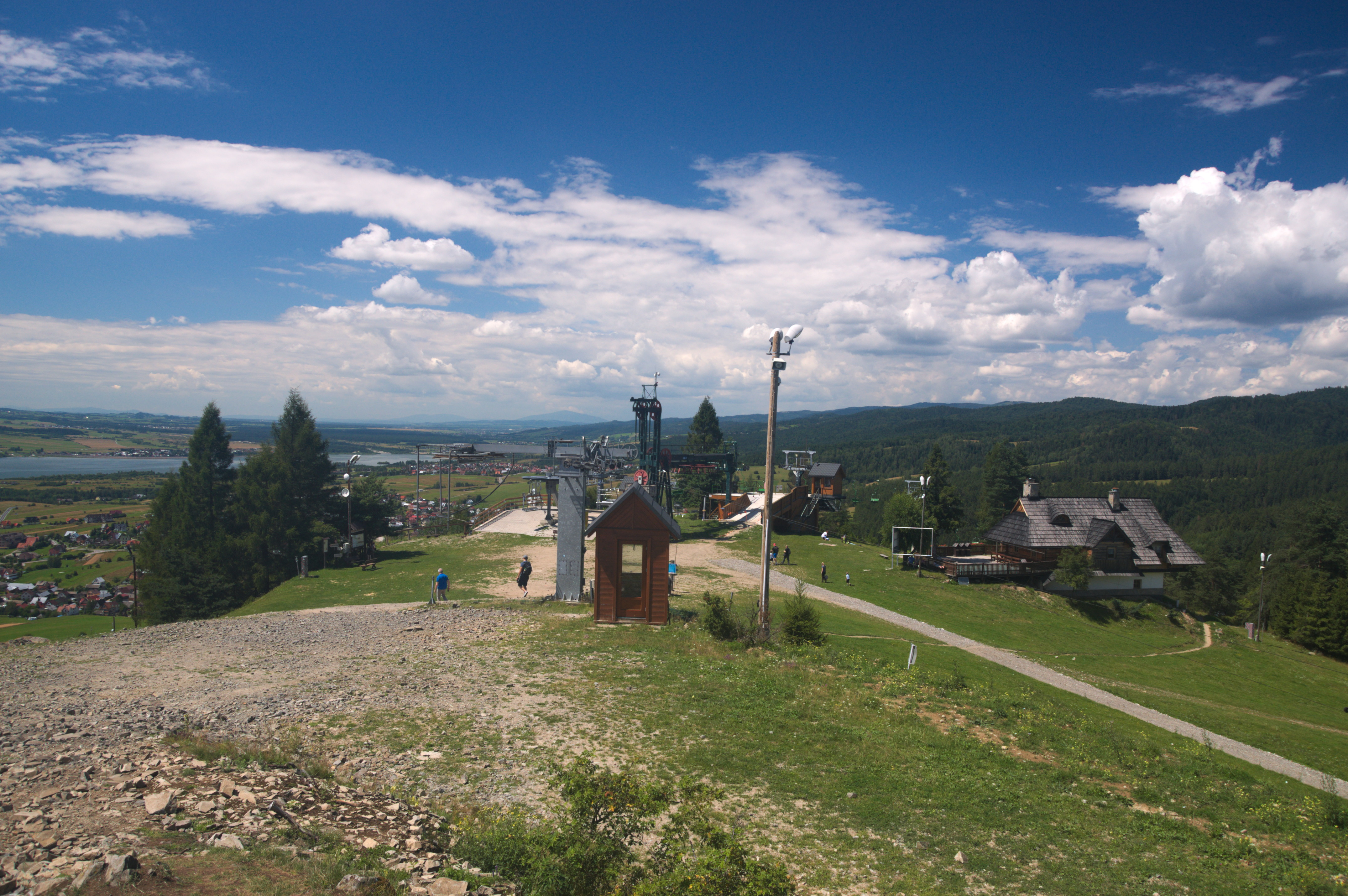 Widok ze szczytu góry Wdżar (767 m n.p.m.) w kierunku zachodnim. Widoczna górna stacja wyciągu, Jezioro Czorsztyńskie, Pilsko i Babia Góra.